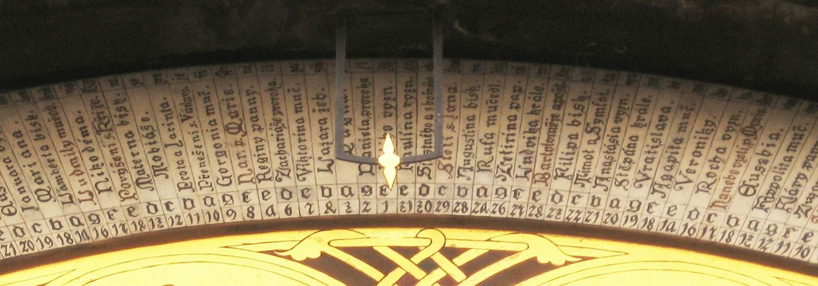 Prager Rathausuhr, Kalendarium, Zeiger